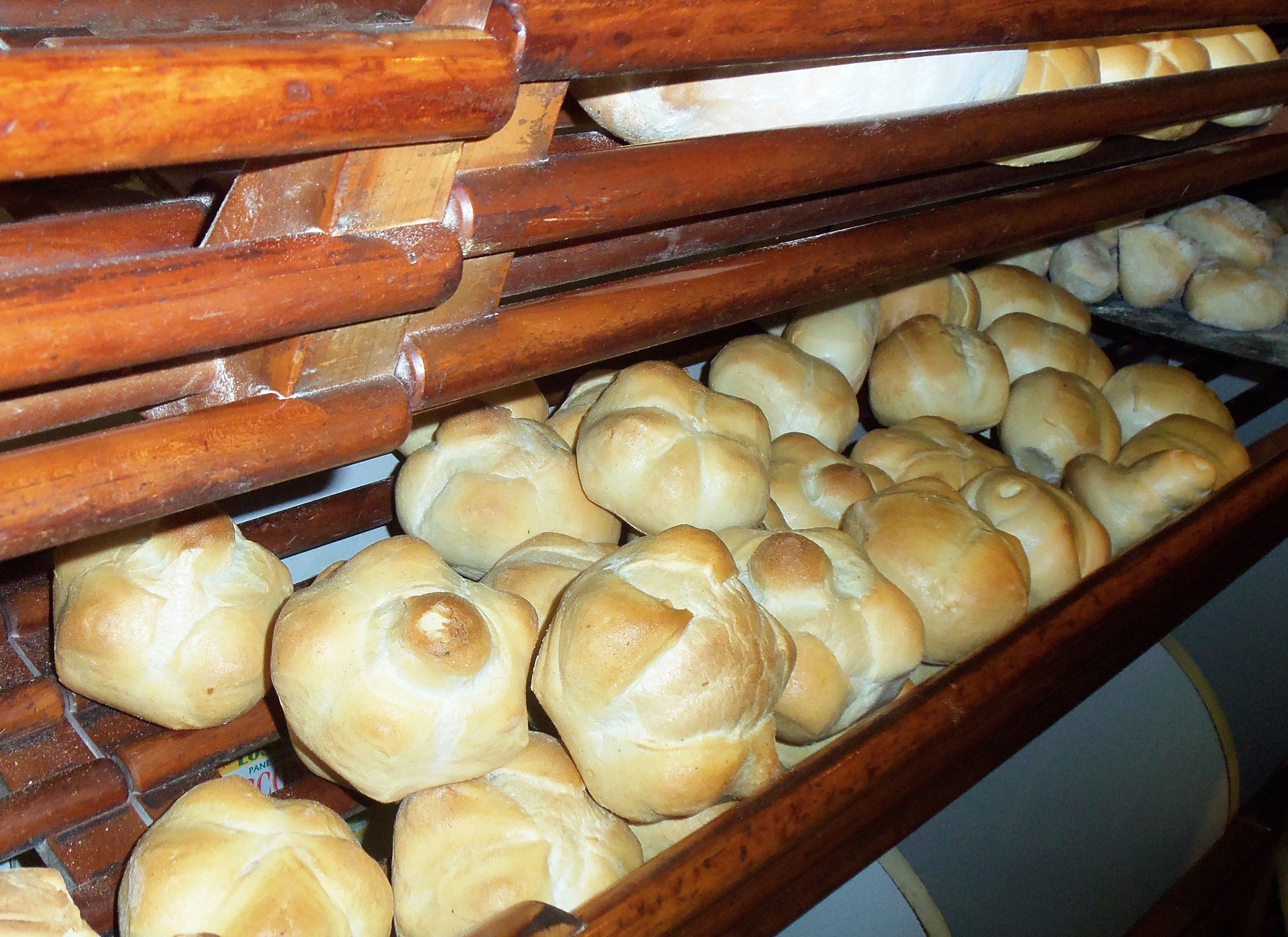 La micchetta, il pane caratteristico di Milano - Italia.